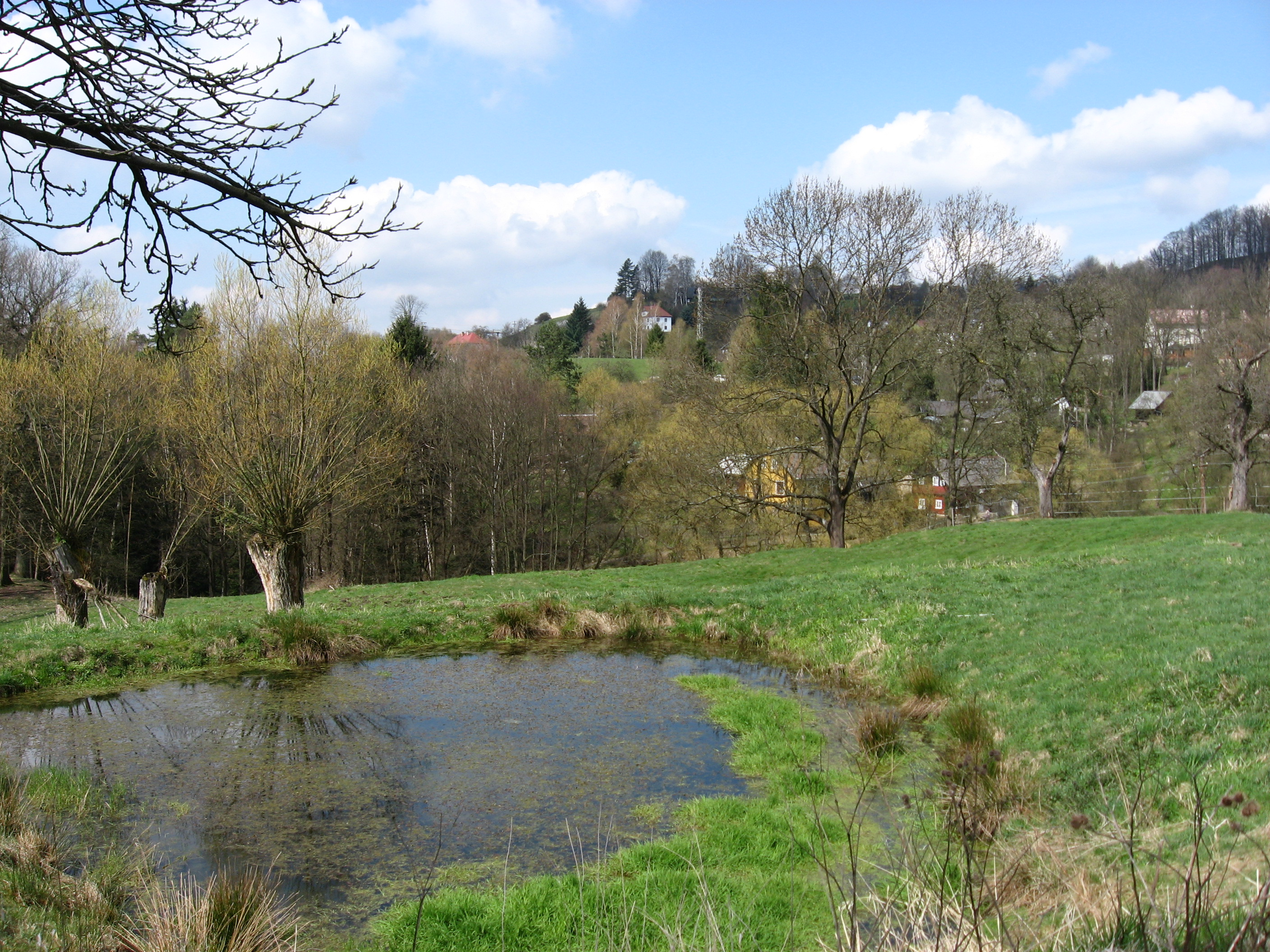 Jetřichovice, Ortsteil Vysoká Lípa, Hofberg